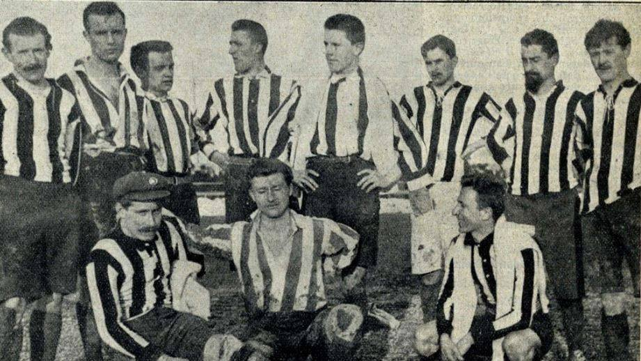 Torino, 22 gennaio 1911. La formazione della Juventus scesa in campo nella sconfitta interna contro la Pro Vercelli (0-4) valevole per la 7ª giornata del girone ligure-lombardo-piemontese del campionato italiano di Prima Categoria 1910-11.